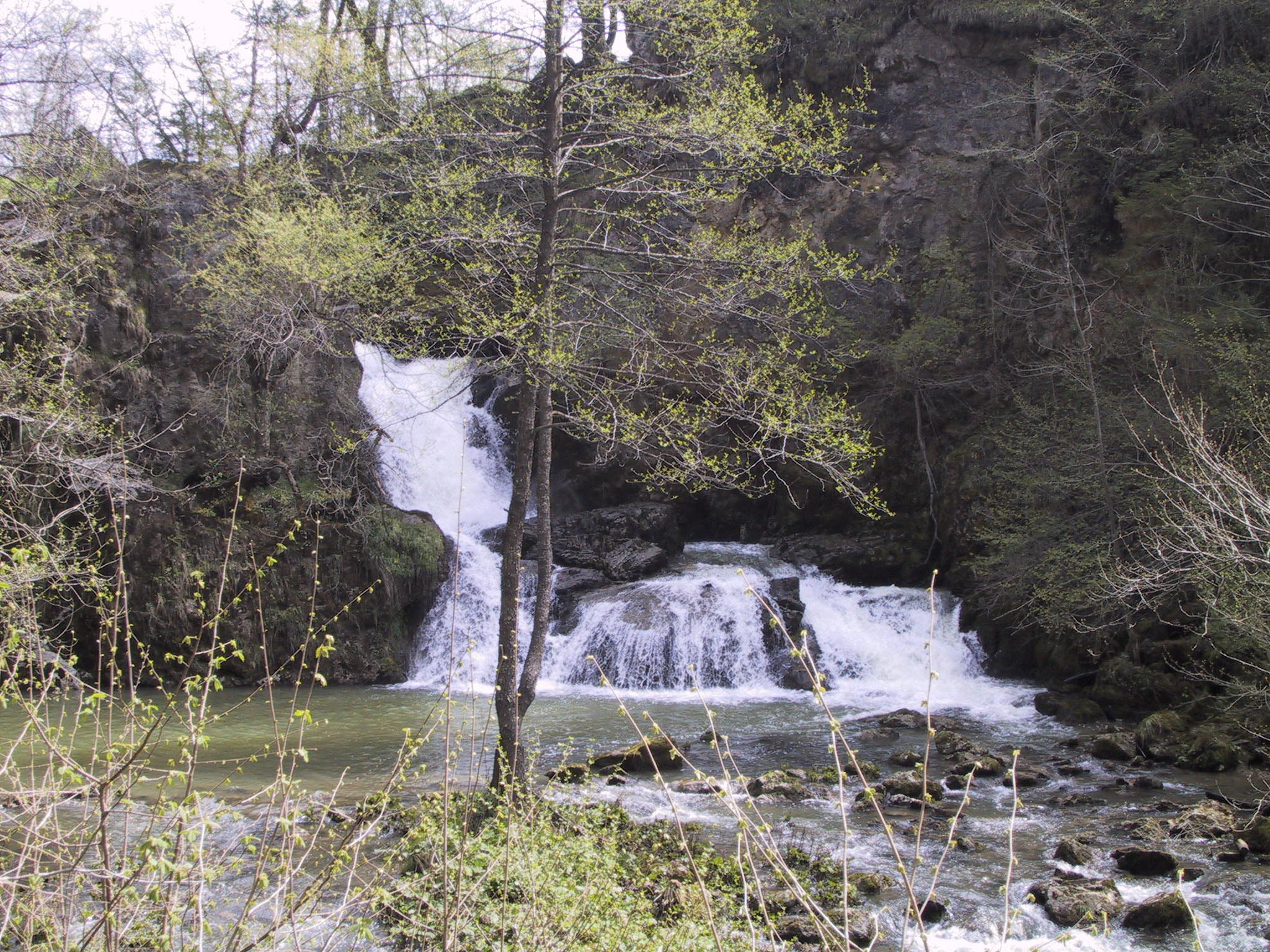 Slap pod Marofom na reki Gračnica, Slovenija.